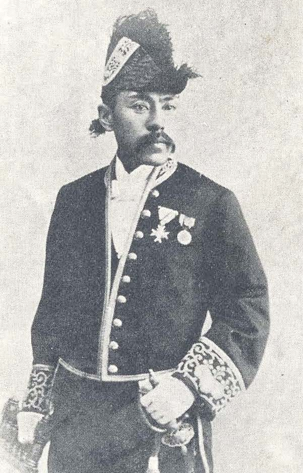 菊池末太郎 Kikuchi Suetarō